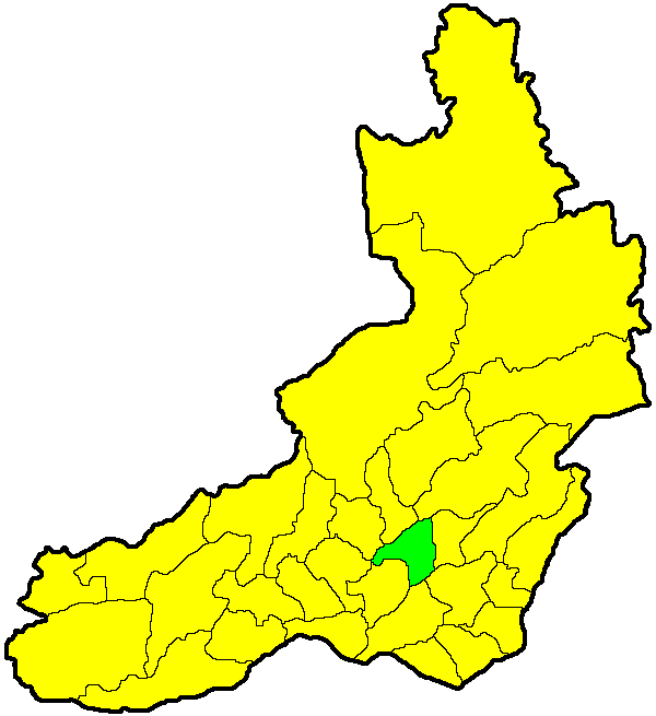 Балейский район на карте Забайкальского края